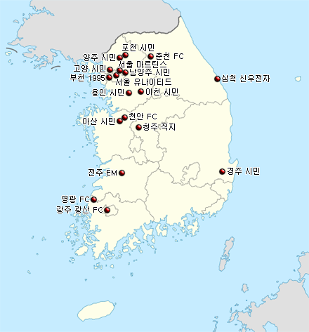 2010 K3 League